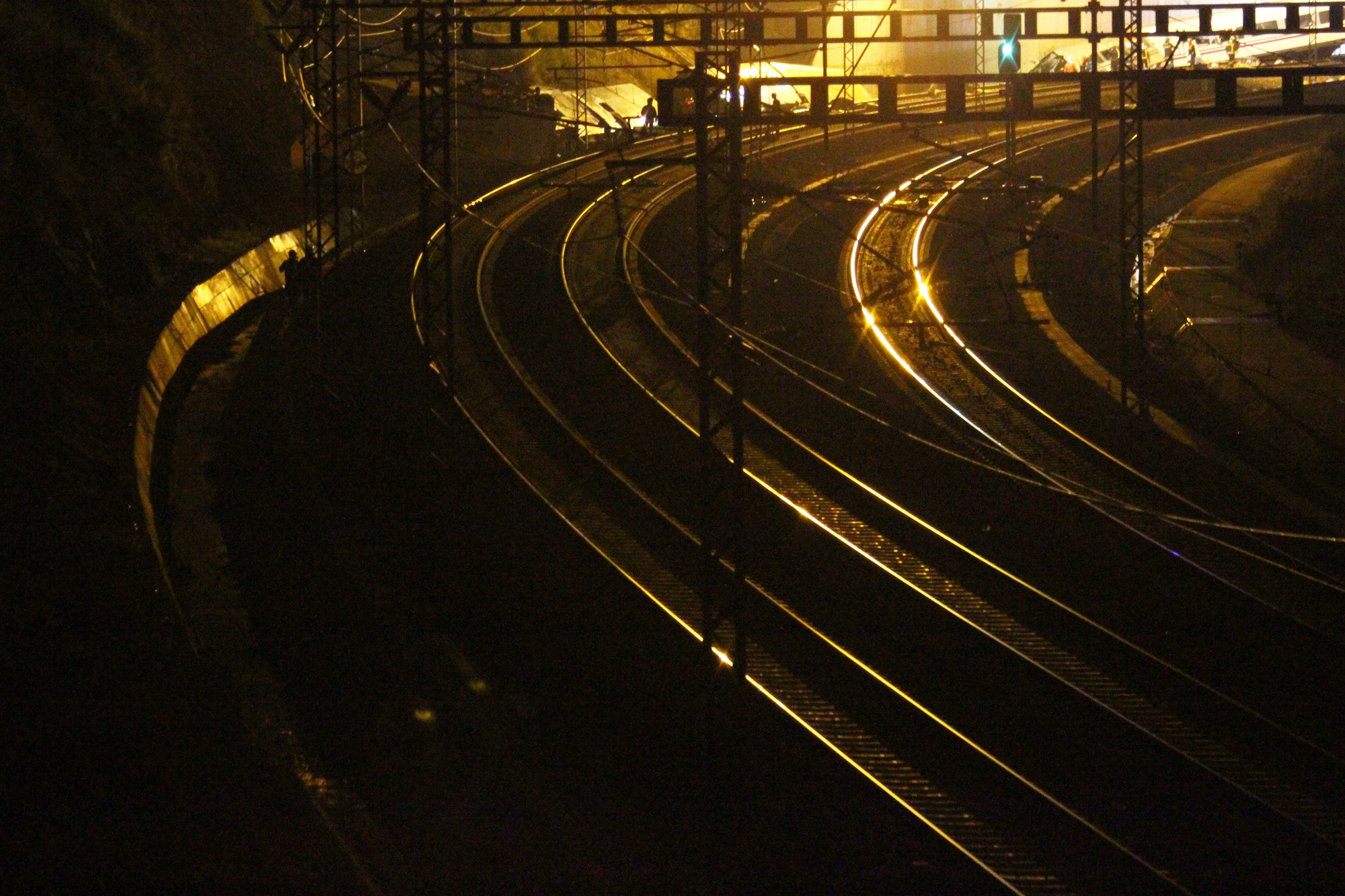 Fotos que hice in situ del accidente ferroviario ocurrido este 24 de julio cerca de Santiago de Compostela. En el momento de escribir estas líneas ya se cuentan 65 muertos. Es el peor accidente ferroviario de España en los últimos 40 años. Tragedy in Santiago de Compostela Photos I made on-site of the train crash on July 24 near Santiago de Compostela. At the time of writing are counted 65 dead. It is the worst rail accident in Spain in the last 40 years.